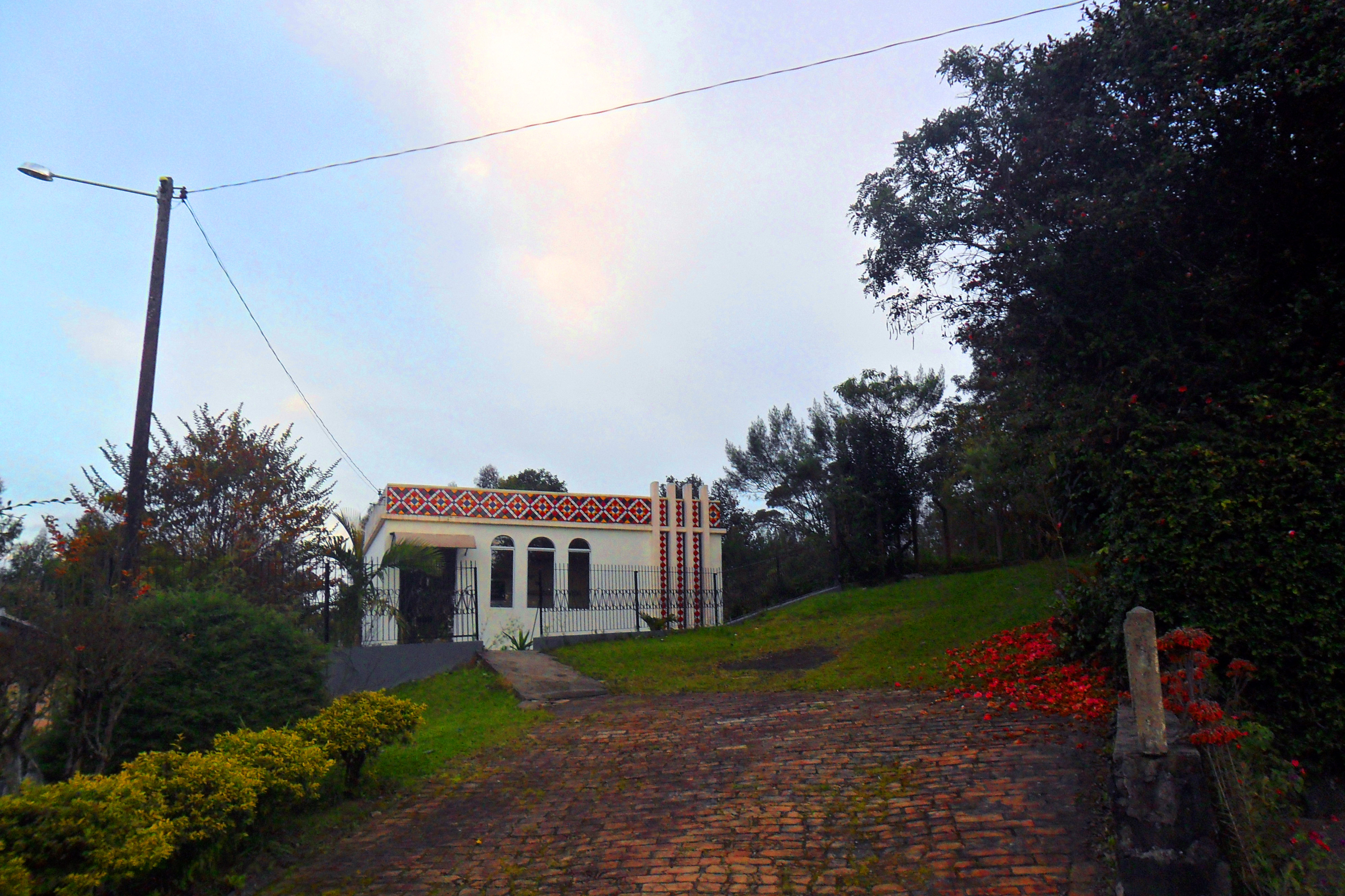 Centro de Traduções Ucranianas em Itaiópolis, Santa Catarina, Brasil